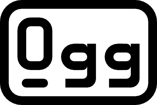 Logo Ogg